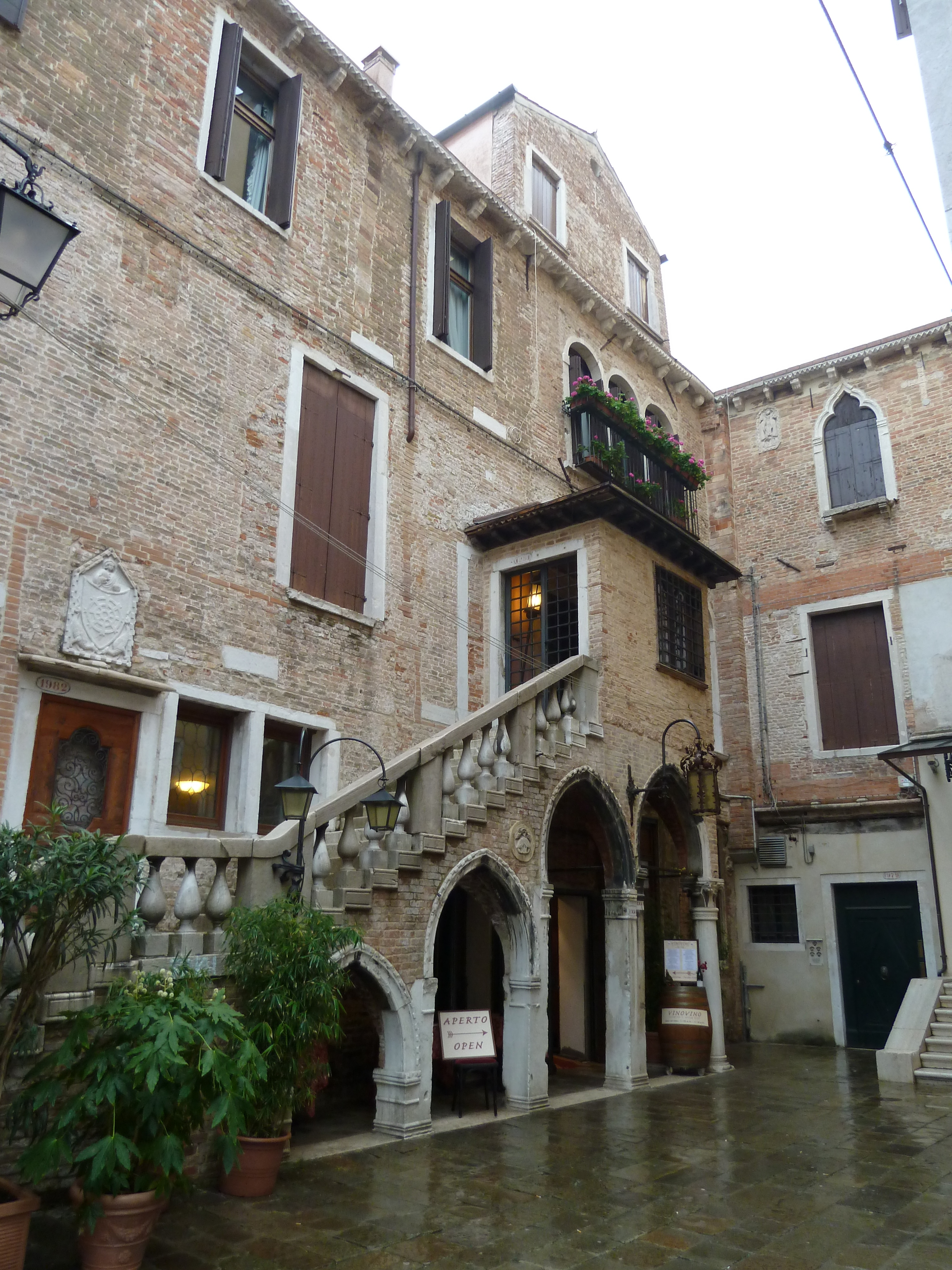 Casa Molin (Venice)